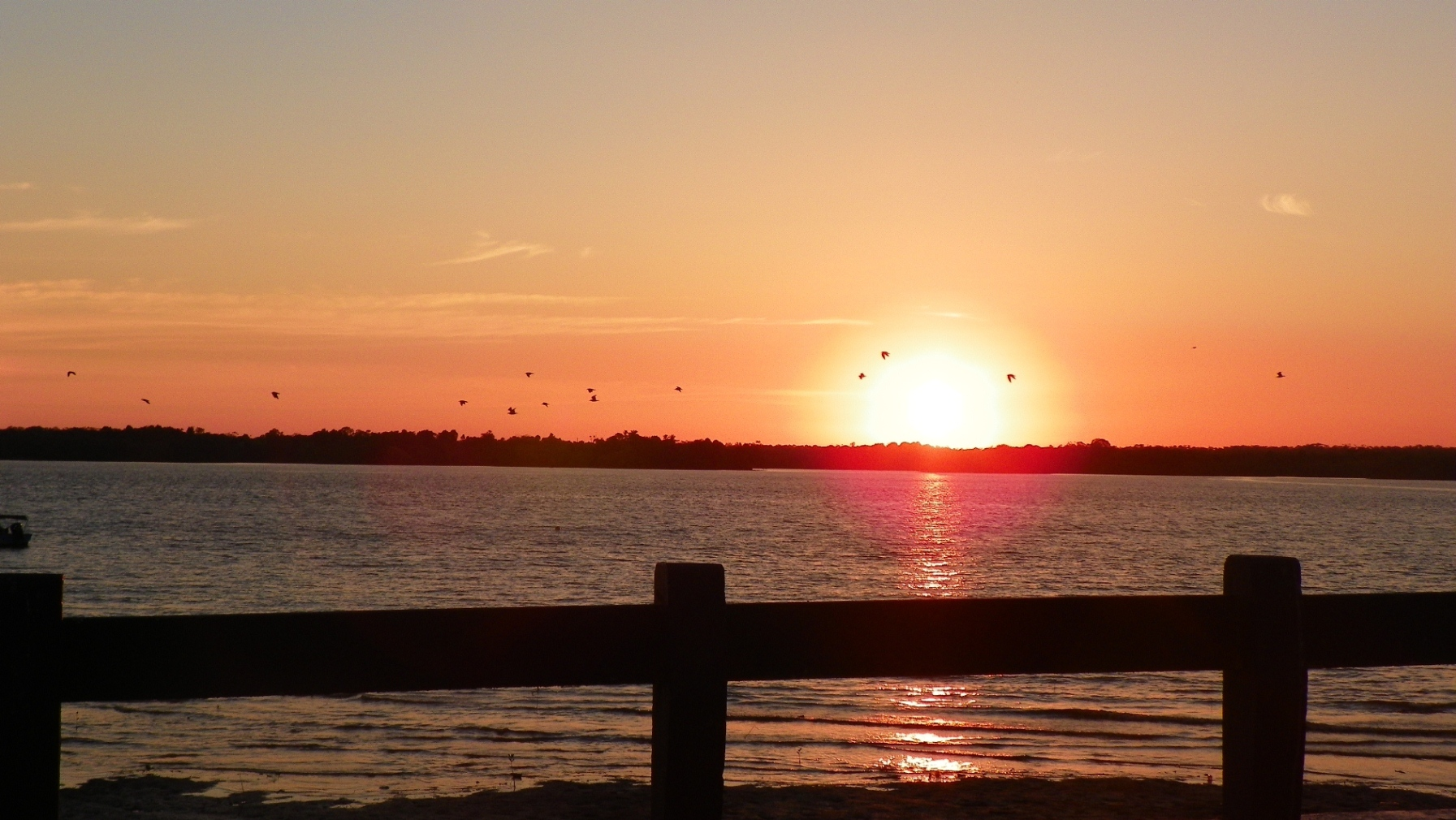 Atardecer en Buenaventura, Colombia